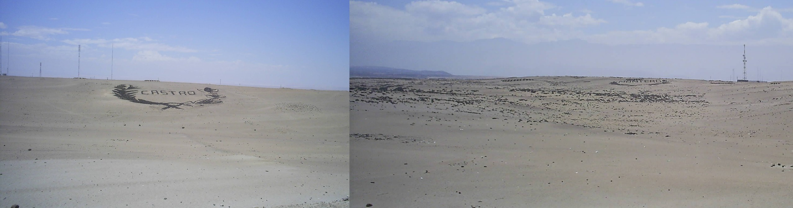 Pampas del cerro Intiorko. Posiciones de Castro y Montero